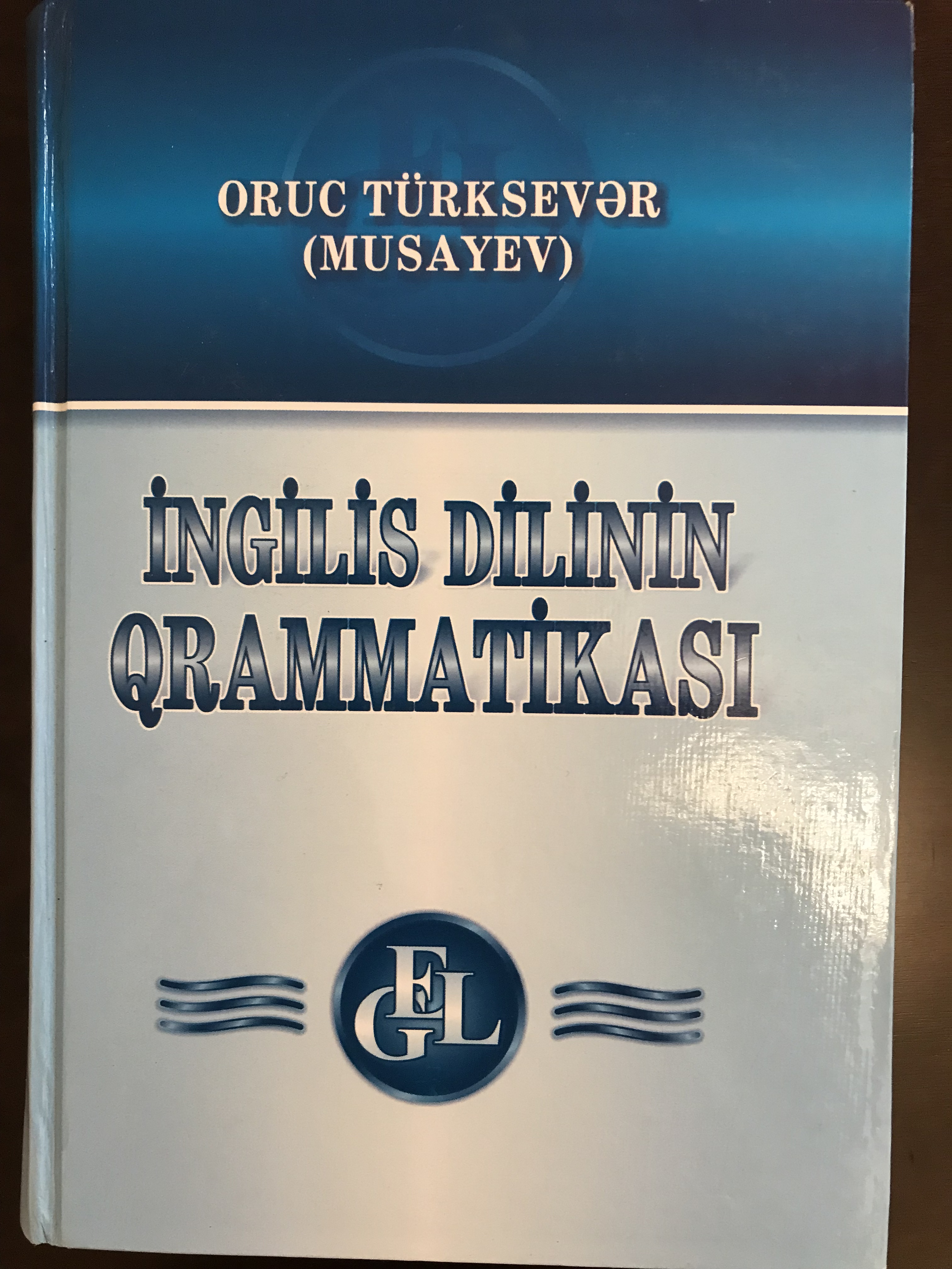 İngilis Dilinin Qrammatikası. Bakı - 2007